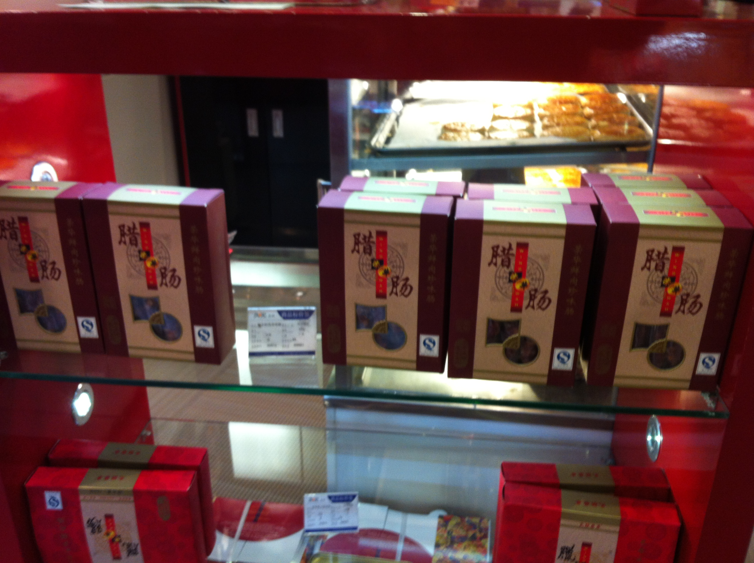 荣华腊肠（中国广东东莞生产）。 中文（香港）: 榮華臘腸（中國廣東東莞生產）。